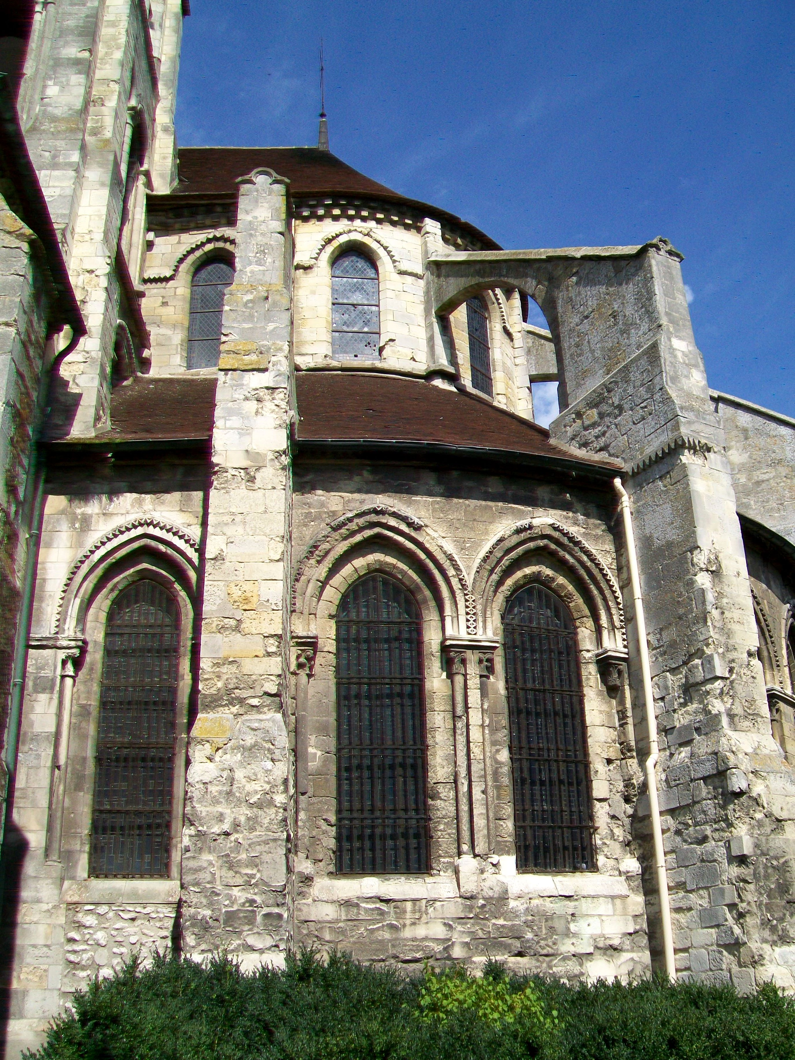 Vue de détail du chœur depuis le sud (jardin de l'église).